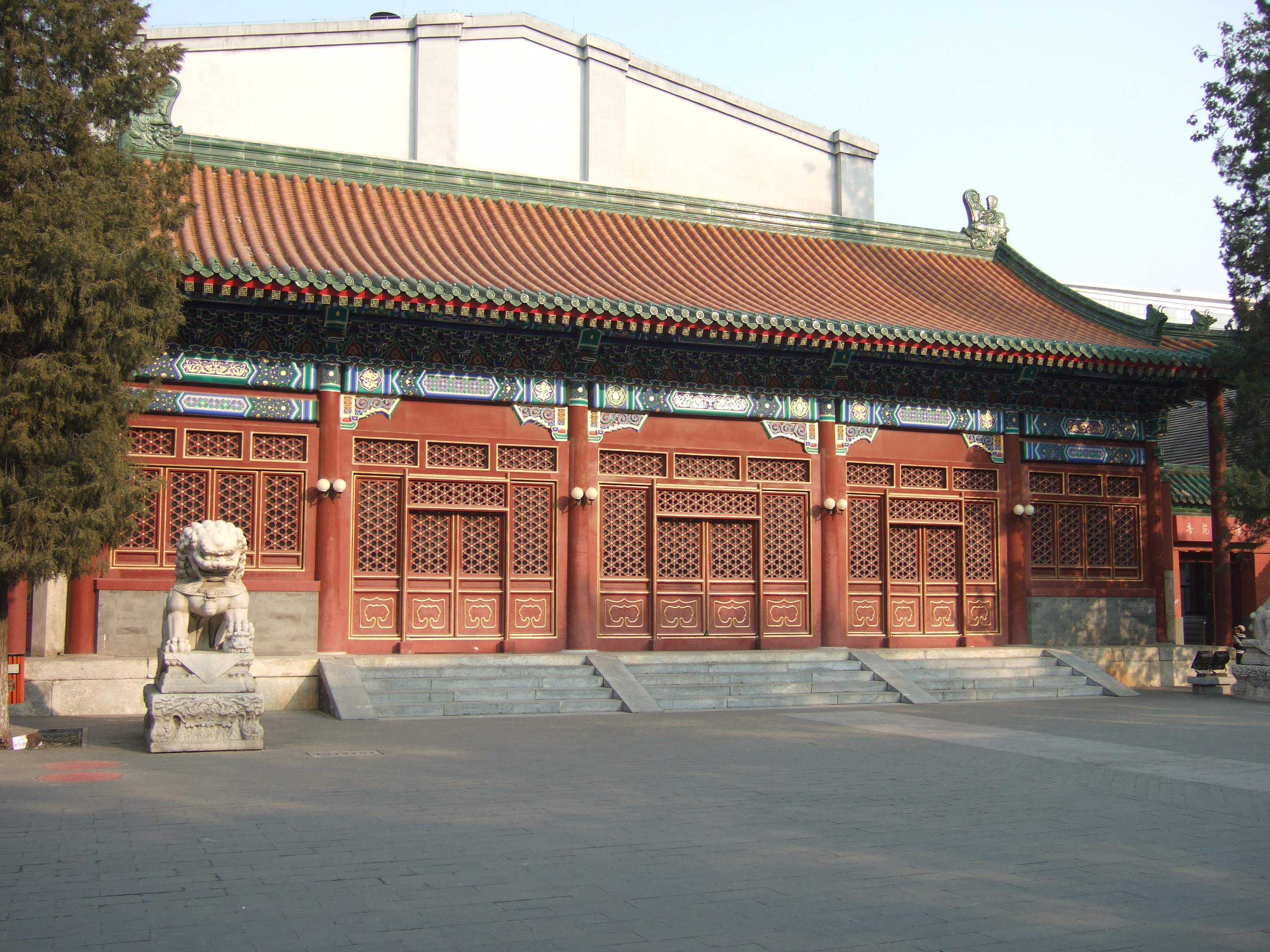 中文（中国大陆）: 位于中央音乐学院内的醇亲王府南府